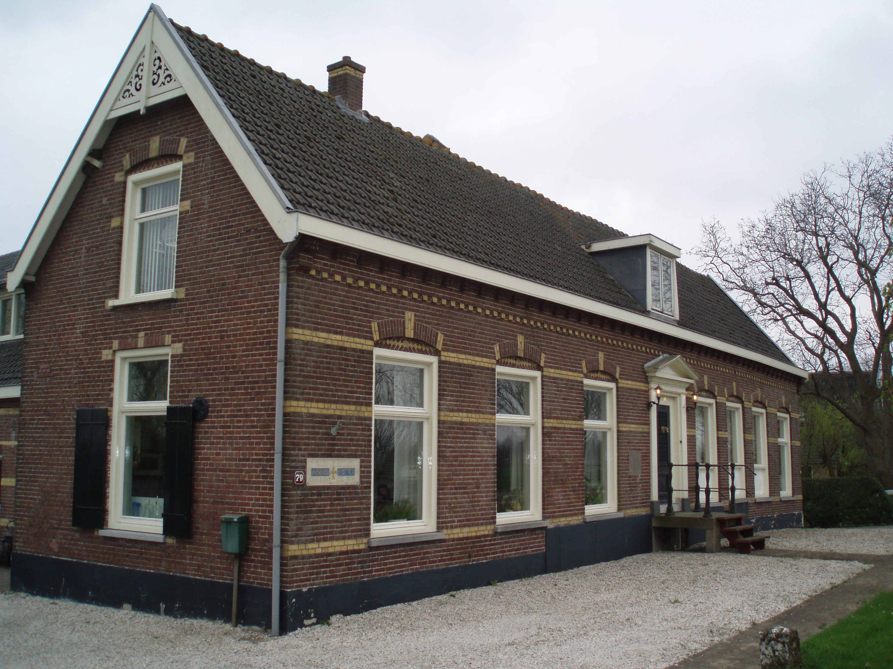 Boerderij Welgelegen te Willeskop uit 1671.